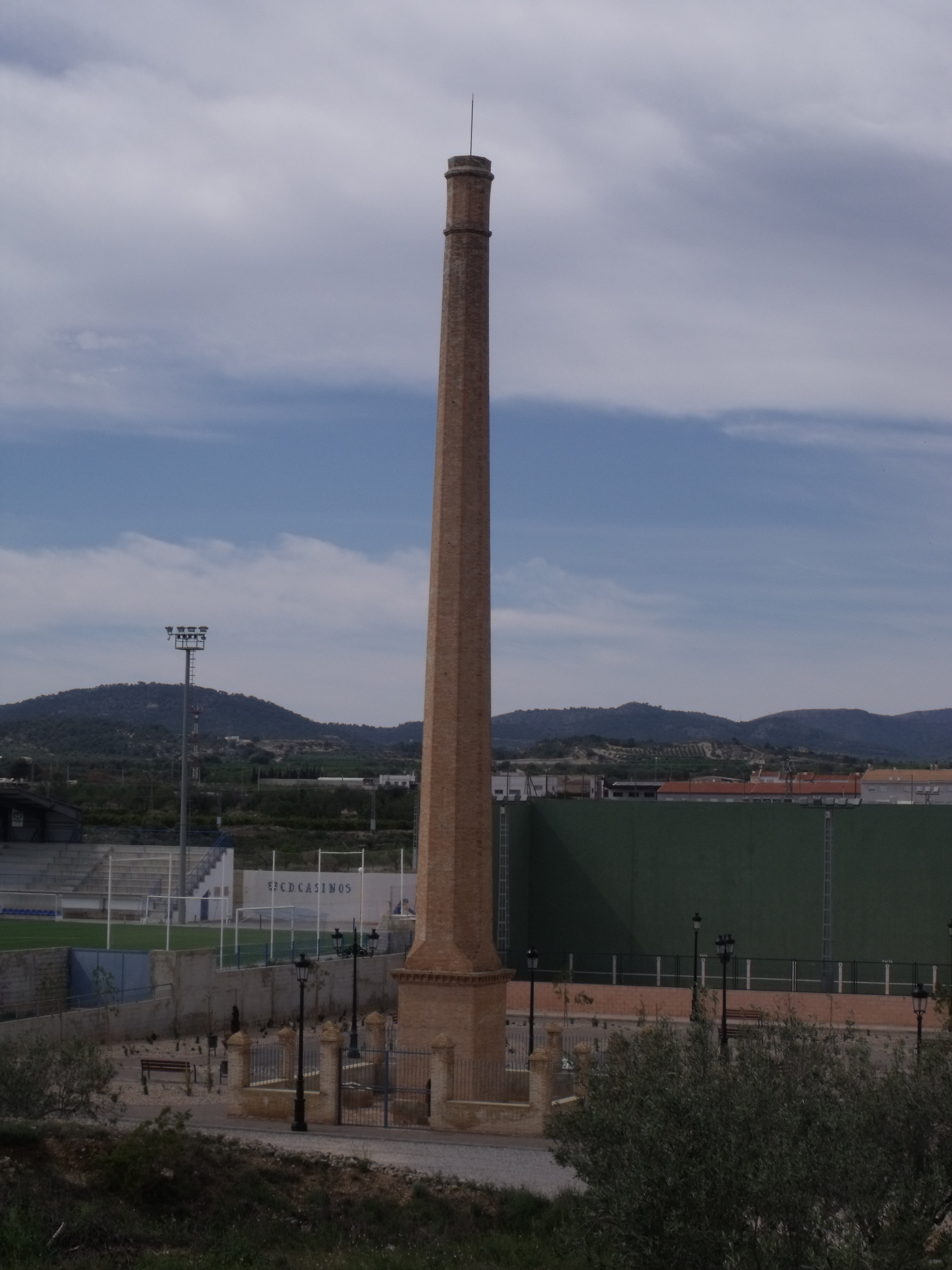 Chimenea protegida de una antigua fábrica